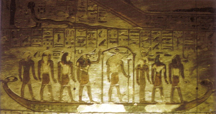 Nachtbarke mit Schlangenköpfen auf dem Weg durch das Land des Sokar, Amduat. Szene aus Grab KV11.